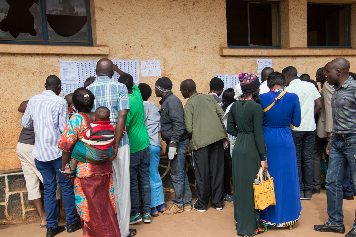 Premier exercice, retrouver son nom sur les listes des électeurs pour identifier son bureau de vote